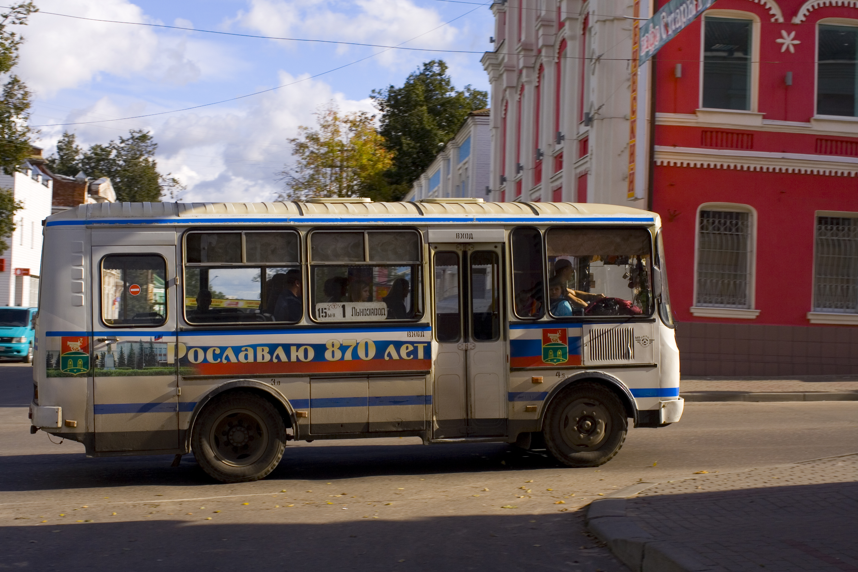 Автобус в Рославле